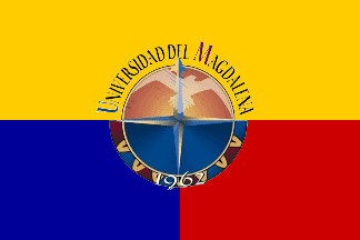 Bandera de la Universidad del Magdalena